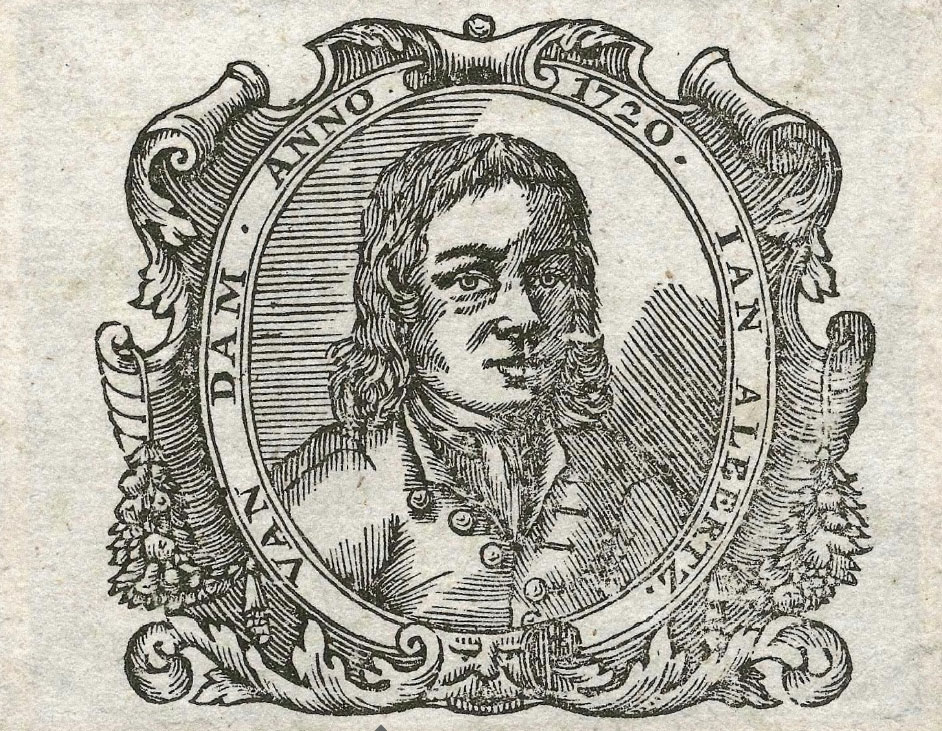 Portret (houtsnede) van Jan Albertsz van Dam, leraar wiskunde en stuurmanskunst, doopsgezind vermaner